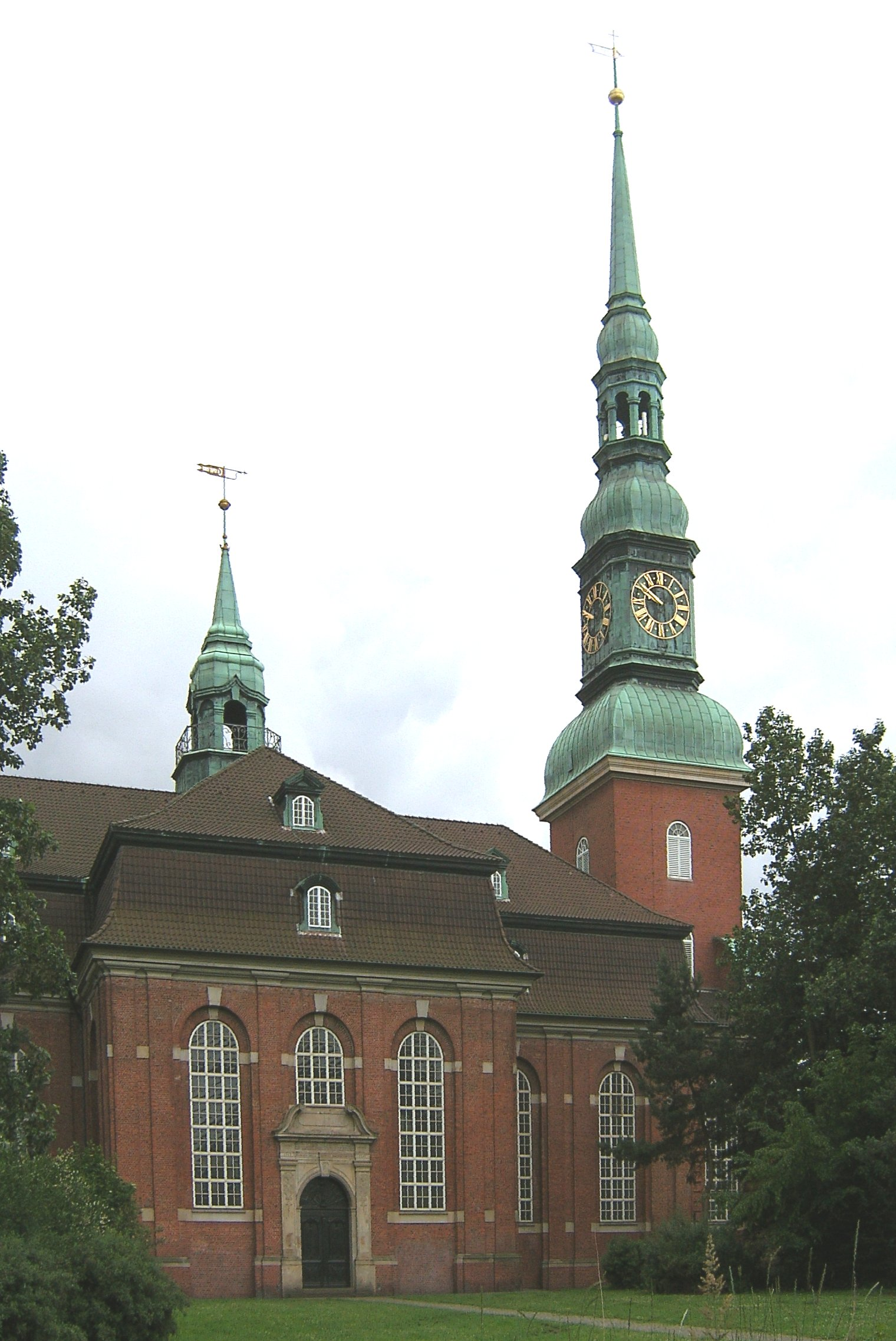 Hamburg, Altona-Altstadt, St. Trinitatis-Kirche